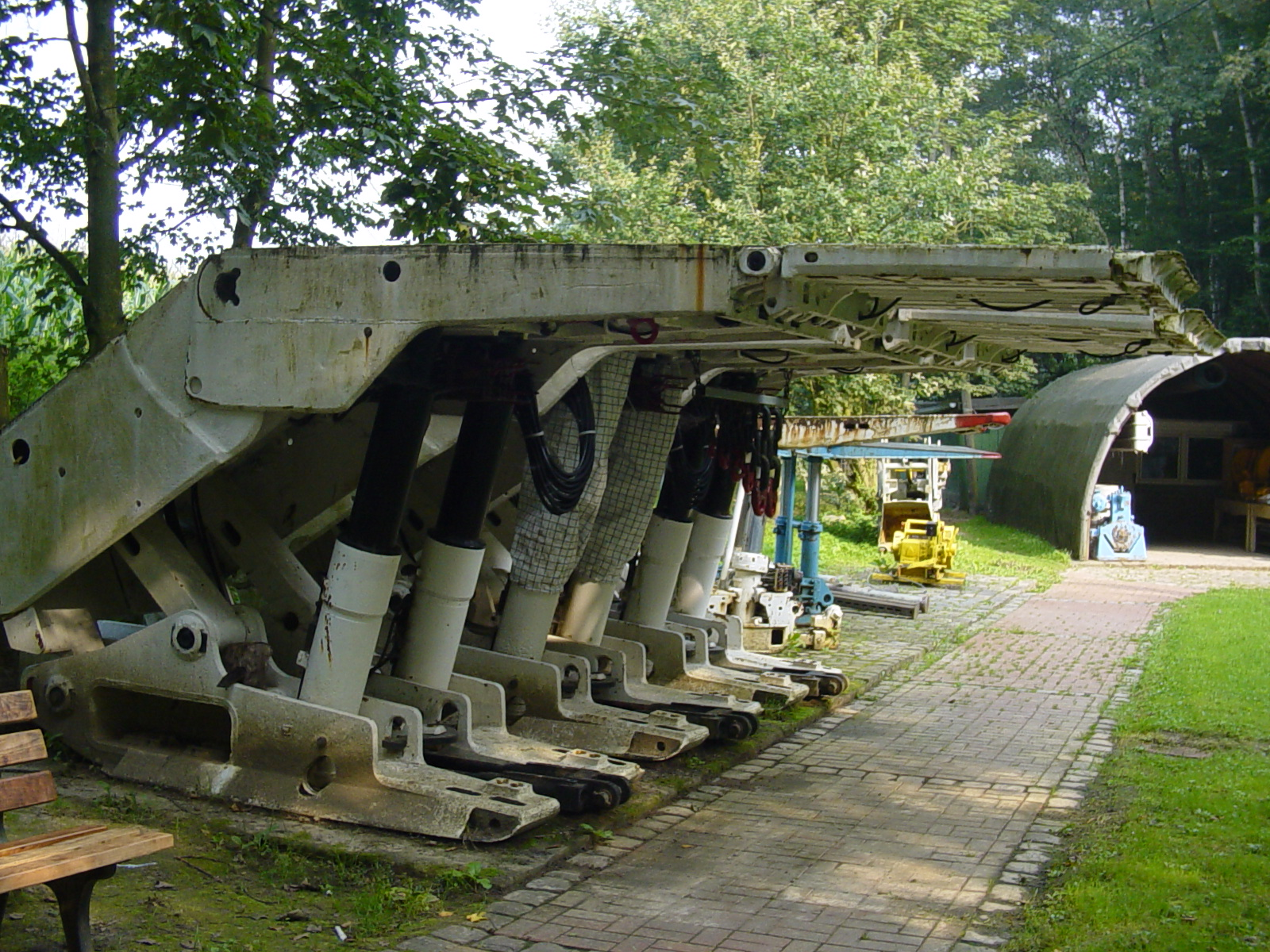 Schildausbau mit Hydraulischen Schilden. Ausstellung am Zechenhaus Herberholz am Bergbauwanderweg Muttental.